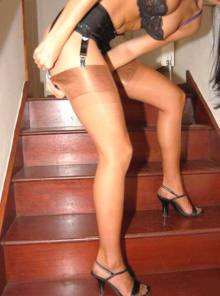 Bronze nylon stockings